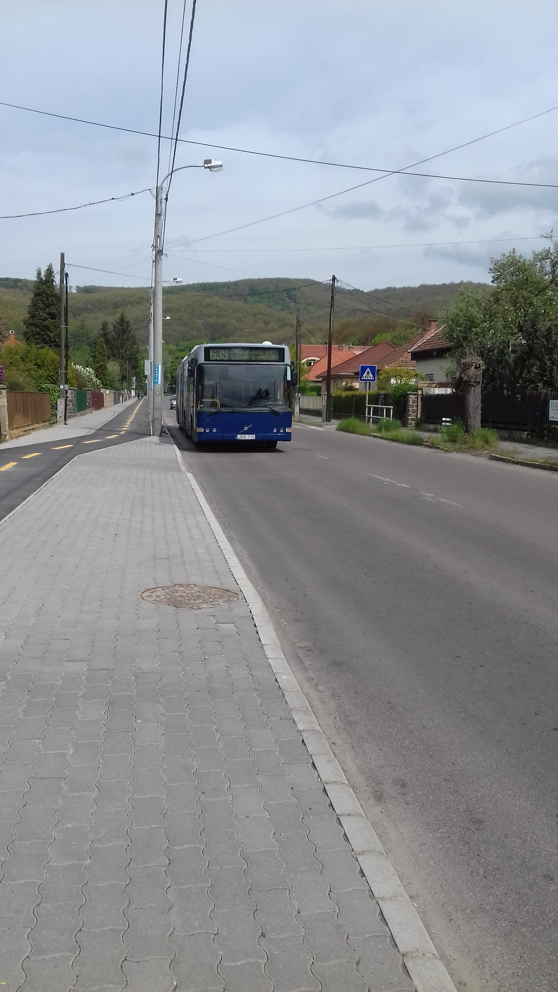 Volvo bus on bus line 63S (63) in Salgótarján